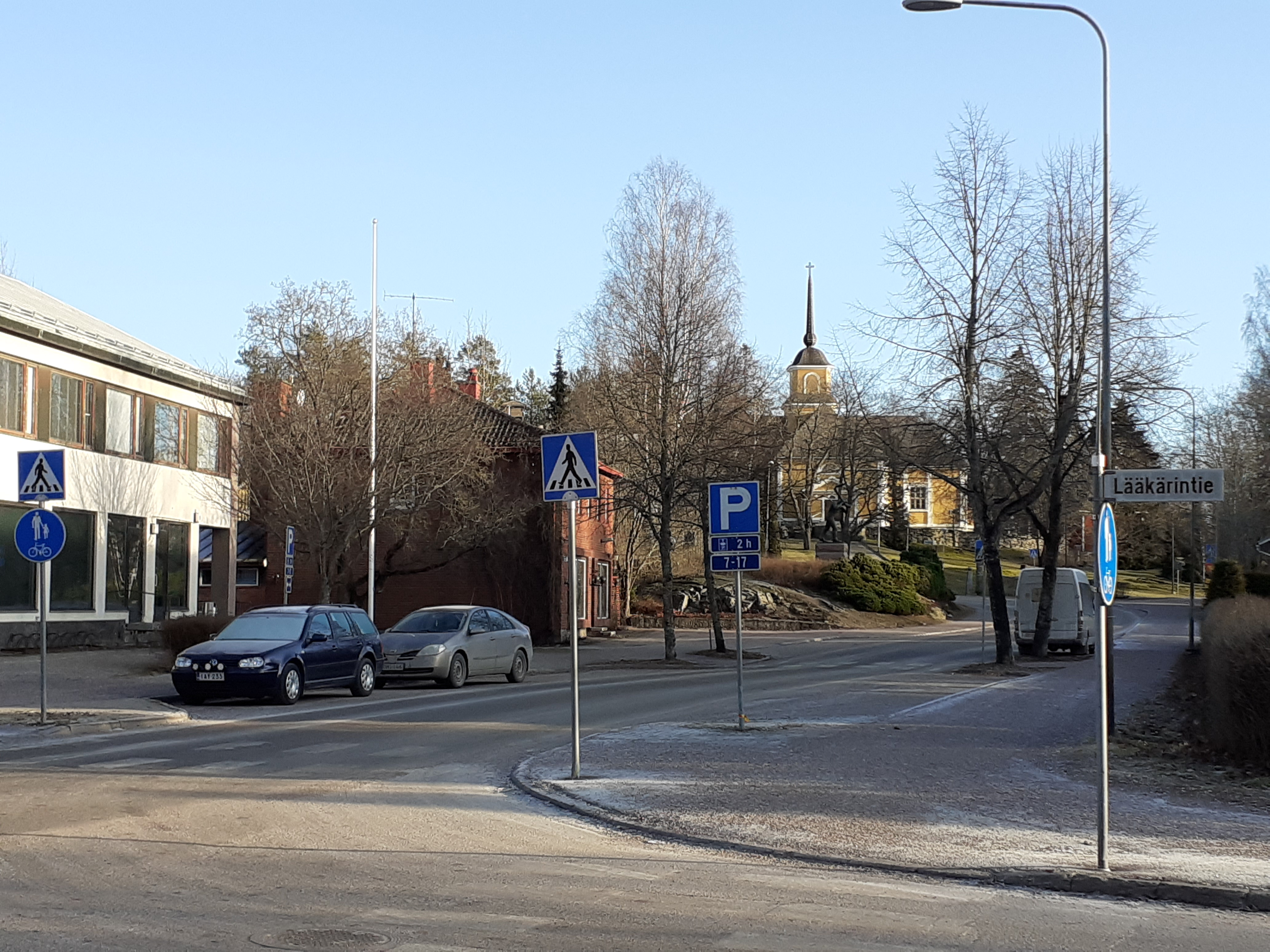 A village street in Nurmijärvi.